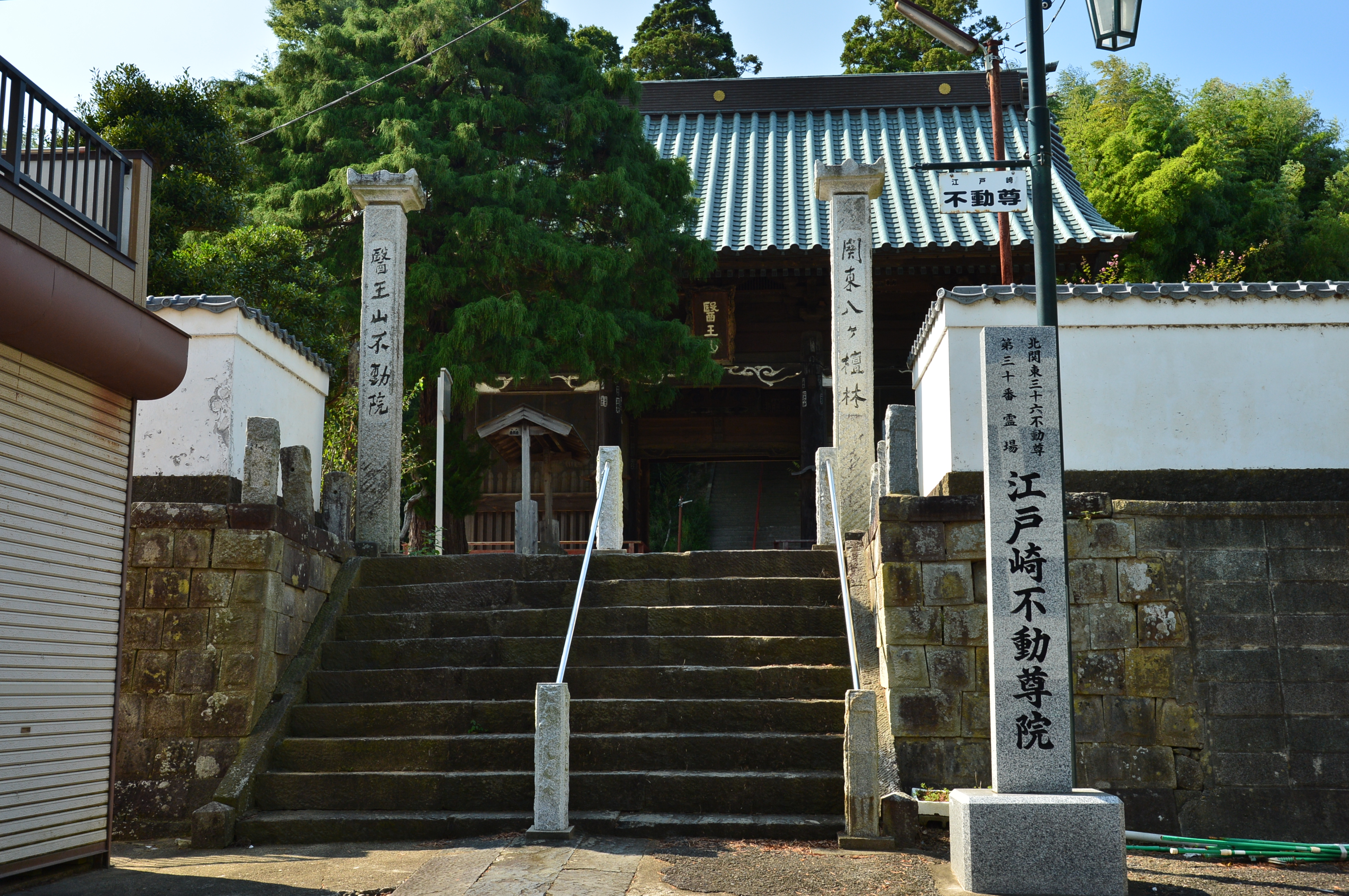 江戸崎不動尊院の正門（茨城県稲敷市）